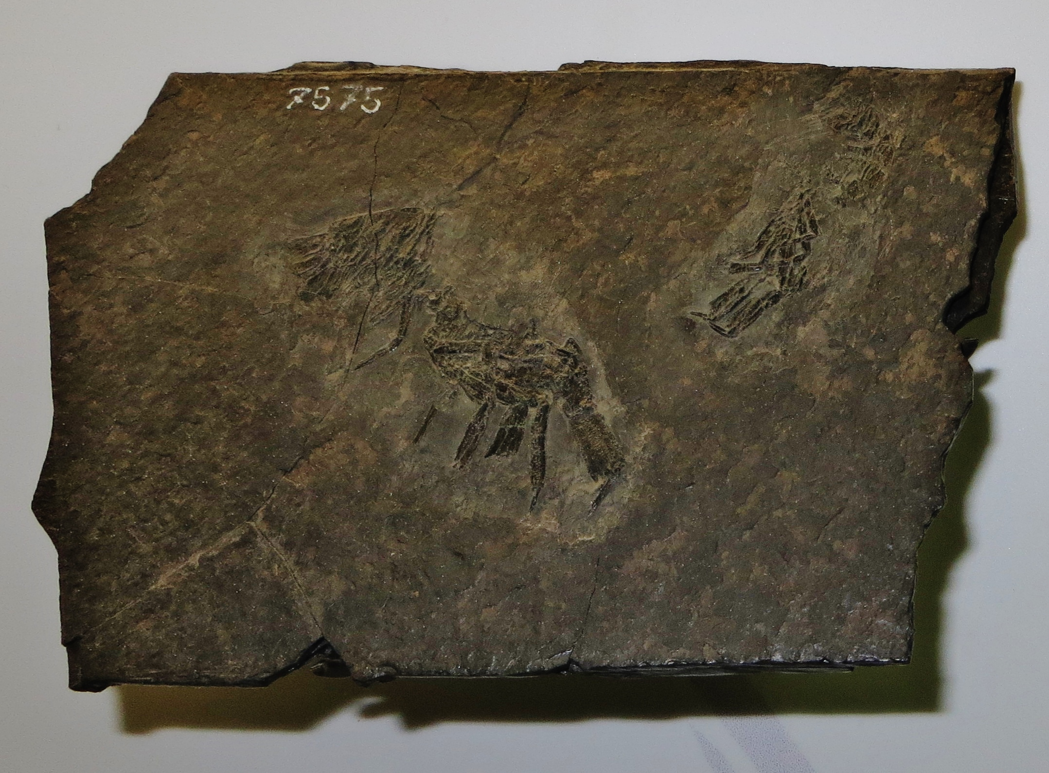 Fossil of Pseudoglyphea, an extinct crustacean - Took the picture at Museo di Scienze Naturali di Bergamo